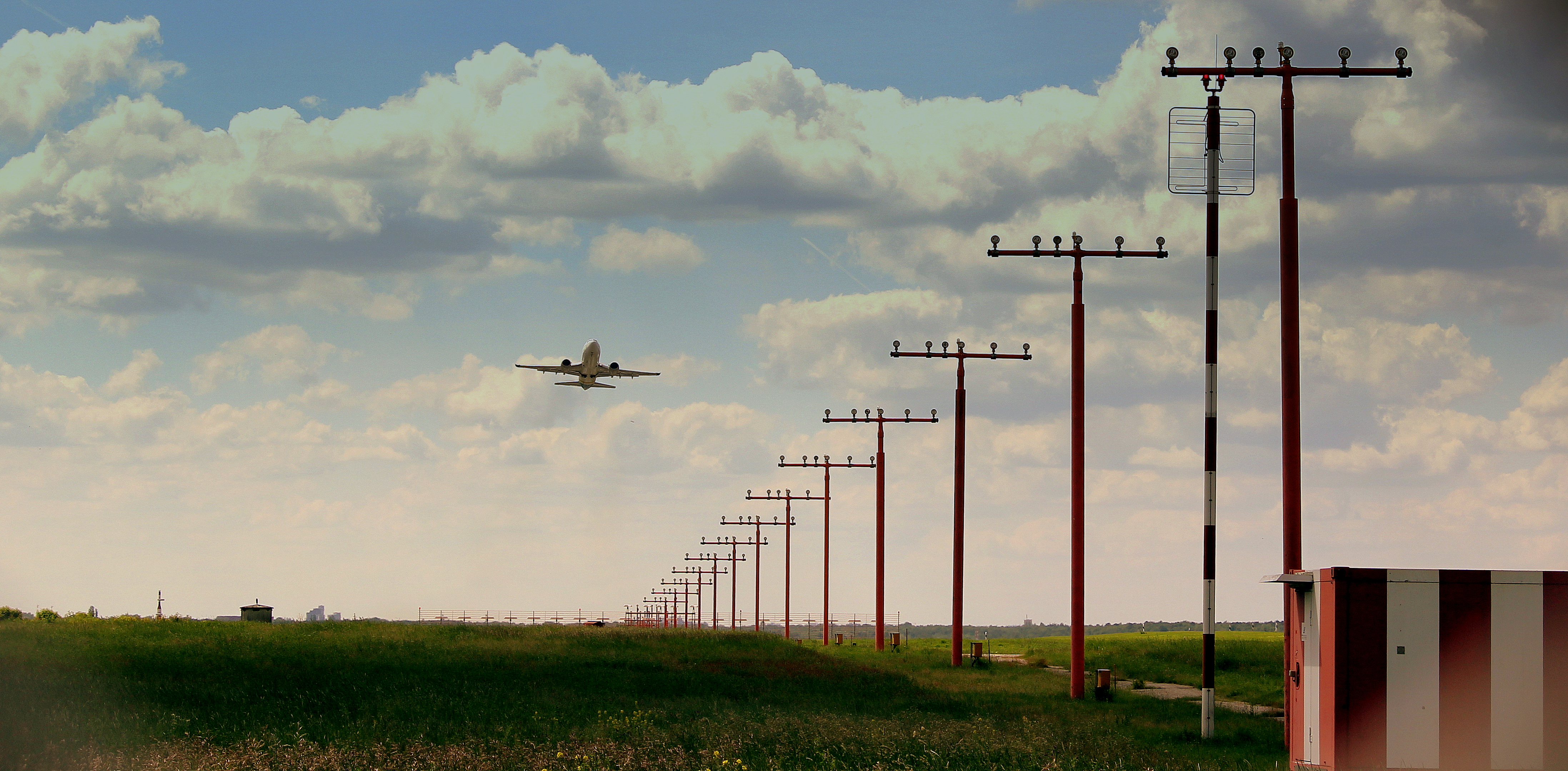 APPROACH LIGHTS AT BERLIN TEGEL AIRPORT WITH AN AIR UKRAINE BOEING 737-400 TAKING OFF BERLIN GERMANY JUNE 2013